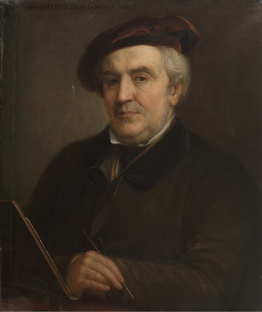 Portret van Johannes Van Acker (Charles Picqué, 1799 - 1869); collection: Musea Brugge - Groeningemuseum